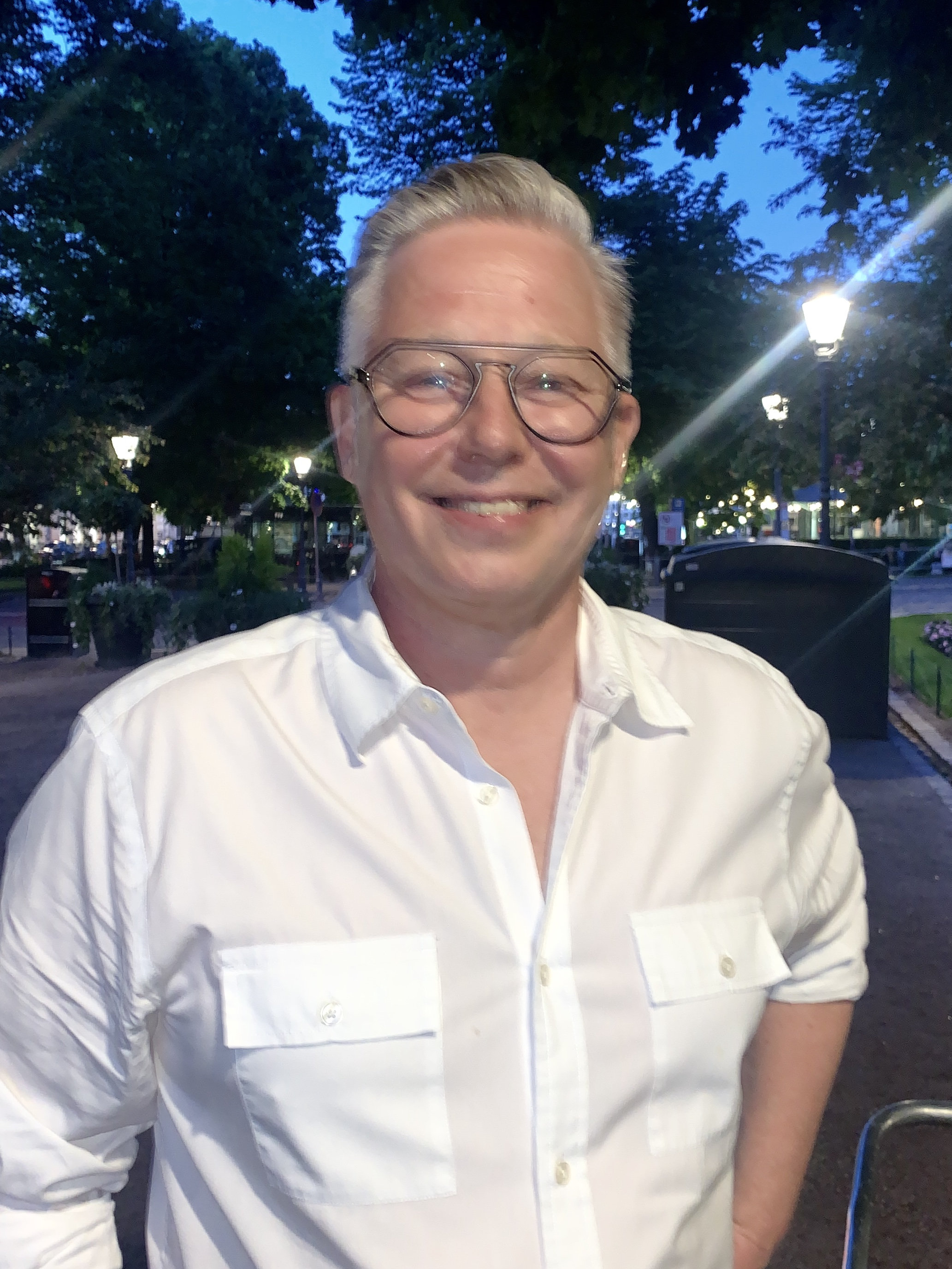 Jyrki Sukula Helsingissä kesäkuussa 2020